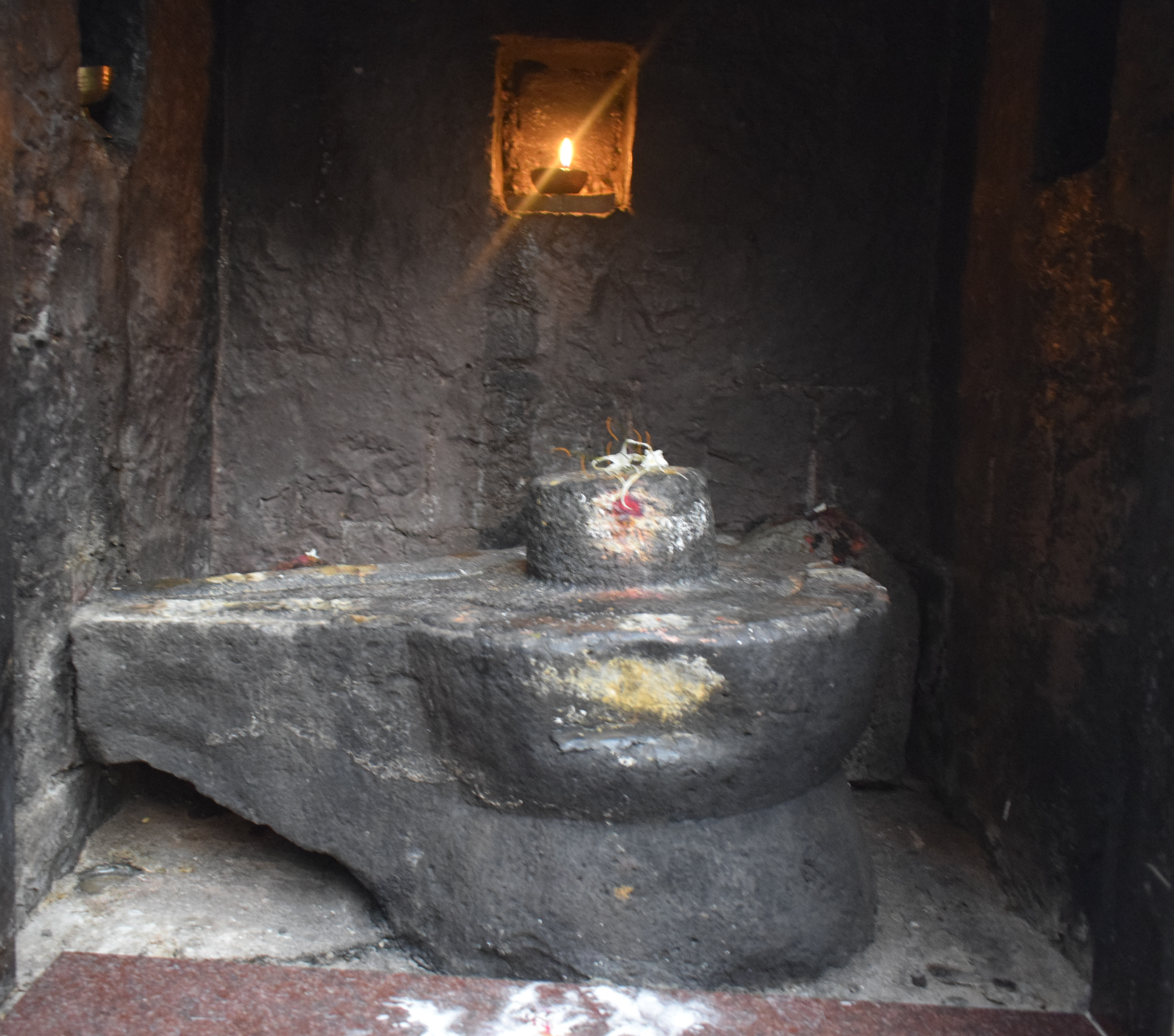 श्री ब्रह्मानादेश्वर लिंग